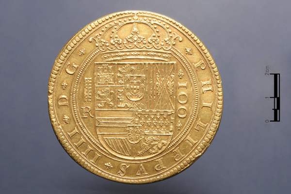 Centén segoviano de 1633 (Edad Moderna). Anverso. La leyenda, en latín, dice "PHILIPPVS IIII D G" (= Felipe IV por la Gracia de Dios"). Número de inventario: 108085.